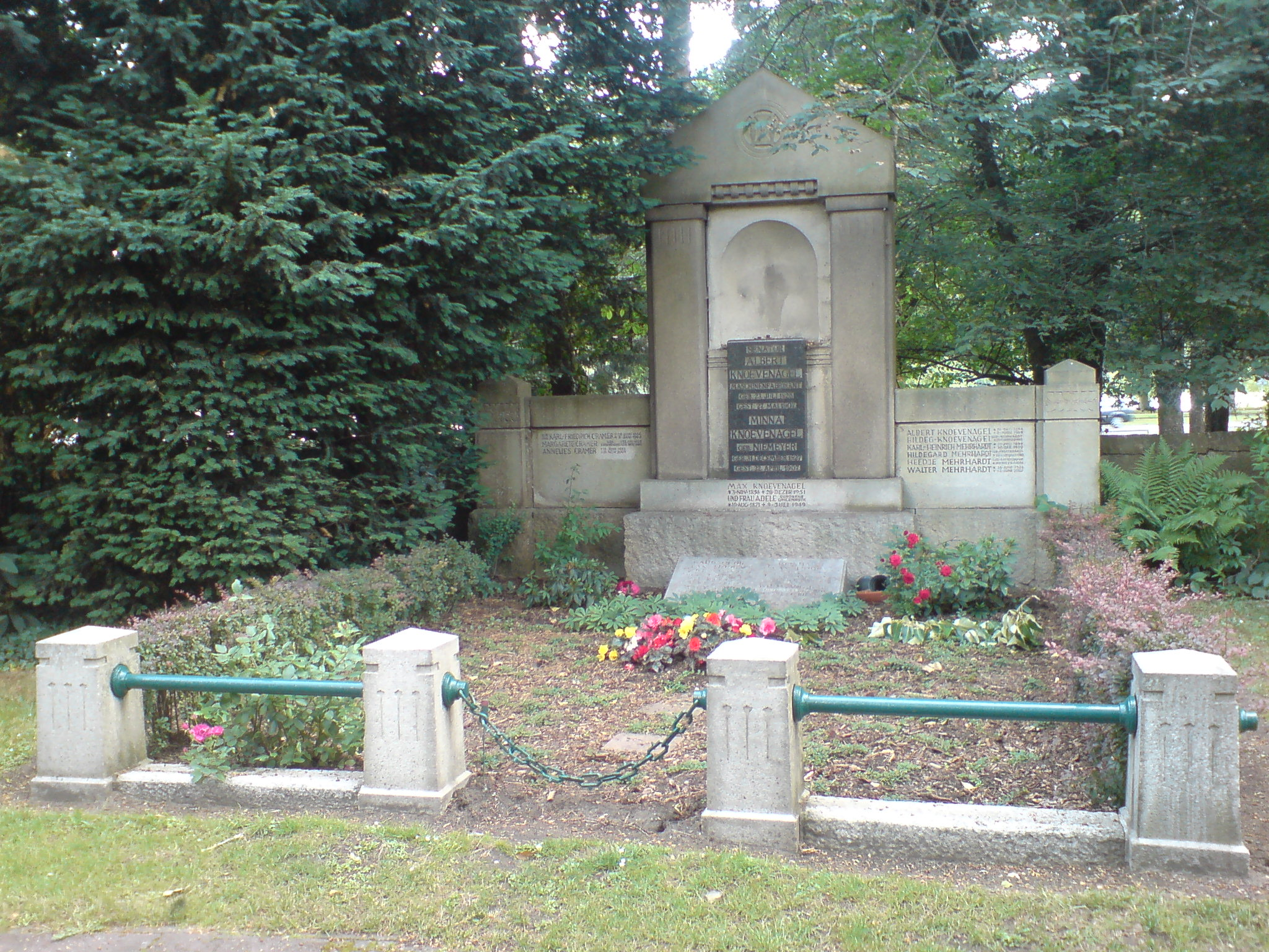 Familiengrab von Albert Knoevenagel; mit den Grabinschriften der weiteren Famileen van Hoorn, Kapp, Cramer und Mehrhardt.